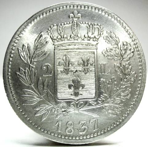 Moneda de 2 Liras del Duque Carlos II de Parma 1837